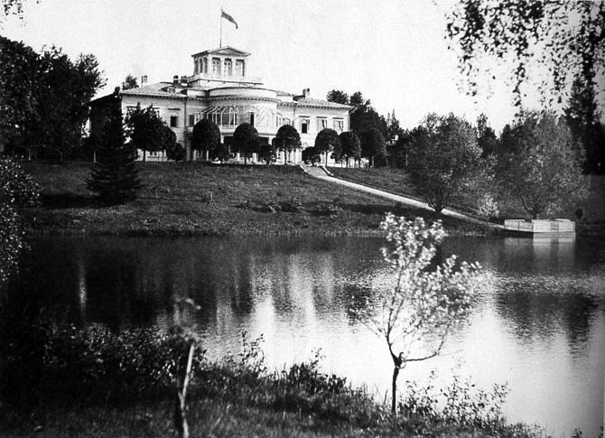 Palace in Osinovaya Roshcha, 1828-30